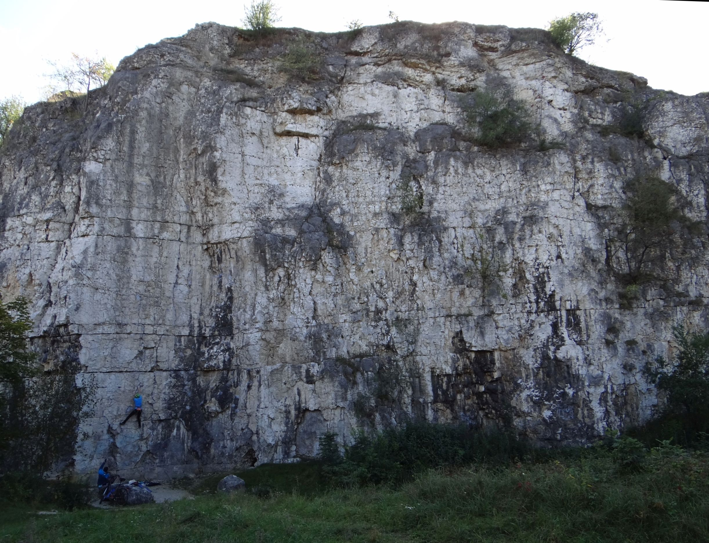 Freney na Zakrzówku w Krakowie